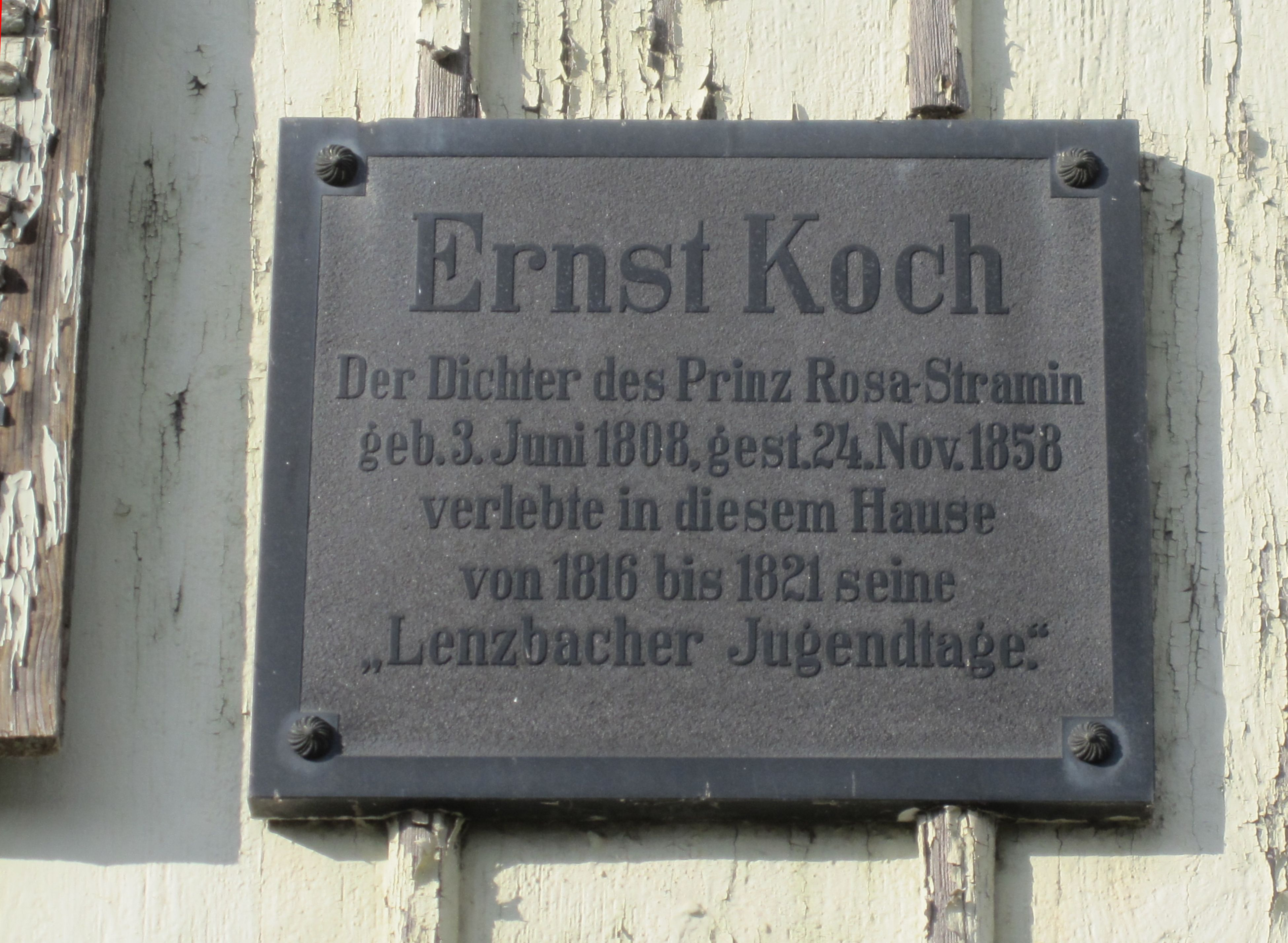 Witzenhausen: Ernst-Koch-Plakette am Brückenhaus auf der Werra-Nordseite erinnert an den Dichter Ernst Koch, der als Kind in Witzenhausen lebte und diese Stadt in seinem Buch Prinz Rosa-Stramin mit dem Namen Lenzbach versah.